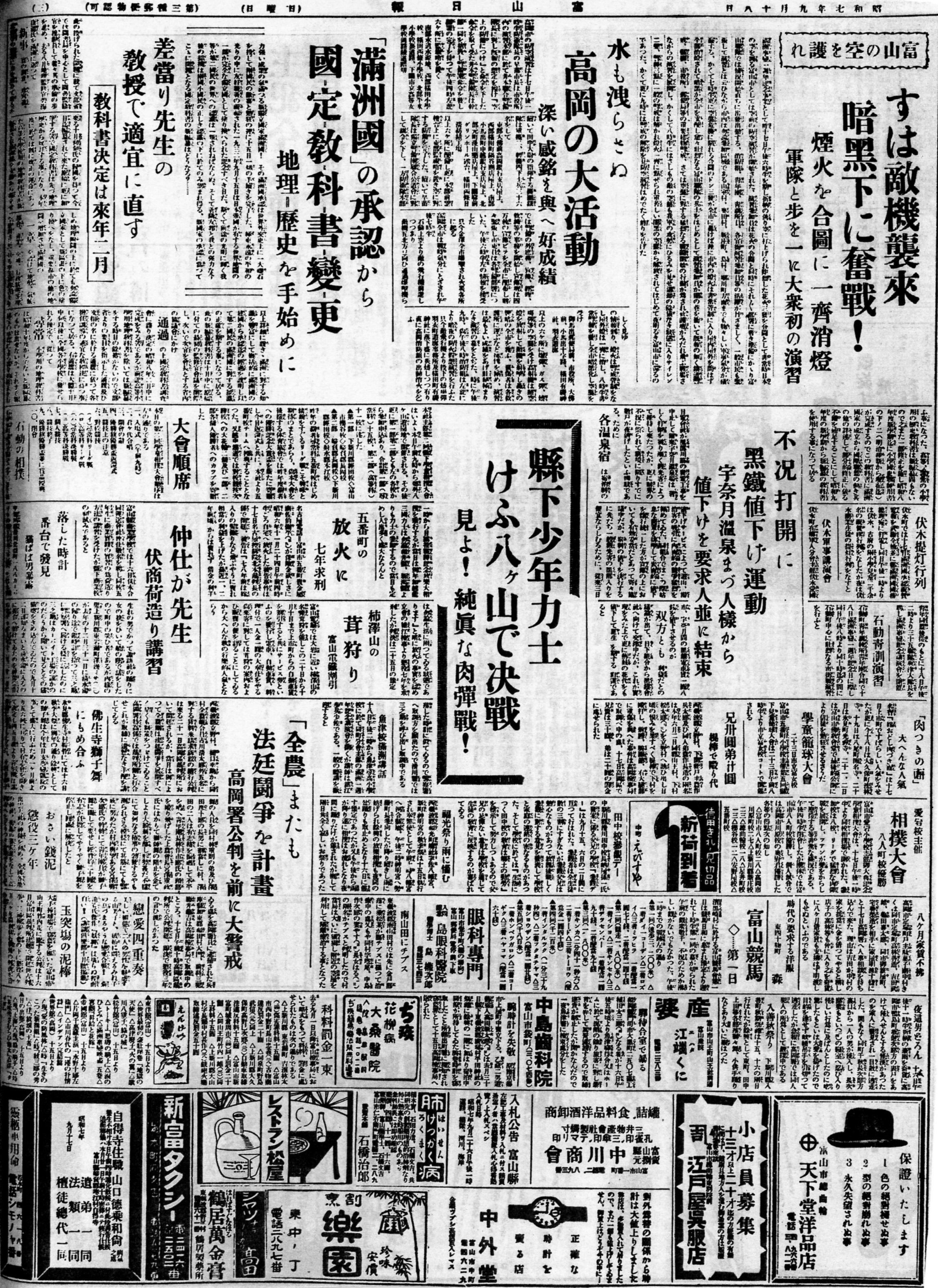 富山県下初防空演習